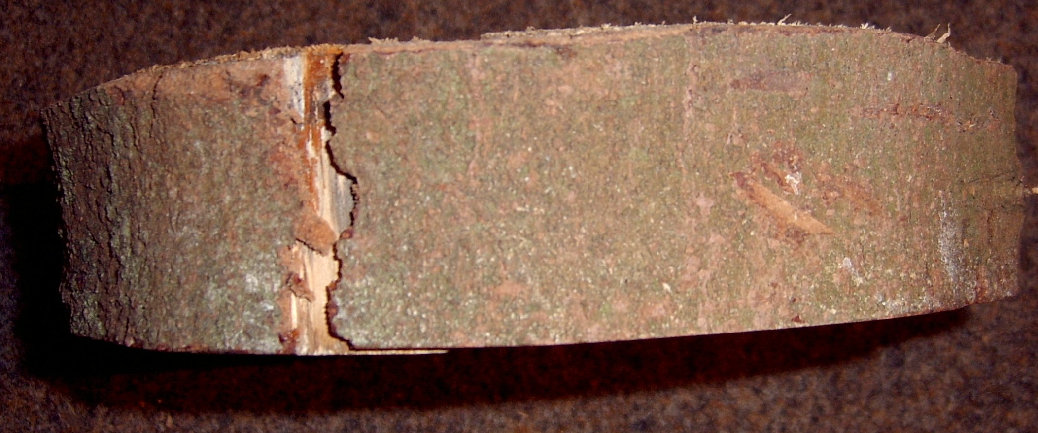 Foto taken by Lumbar 16:37, 6 November 2005 (UTC) in Osnabrück